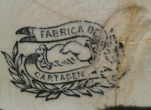 Sello o marca de la fábrica de porcelana La Amistad. Cartagena. S. XIX